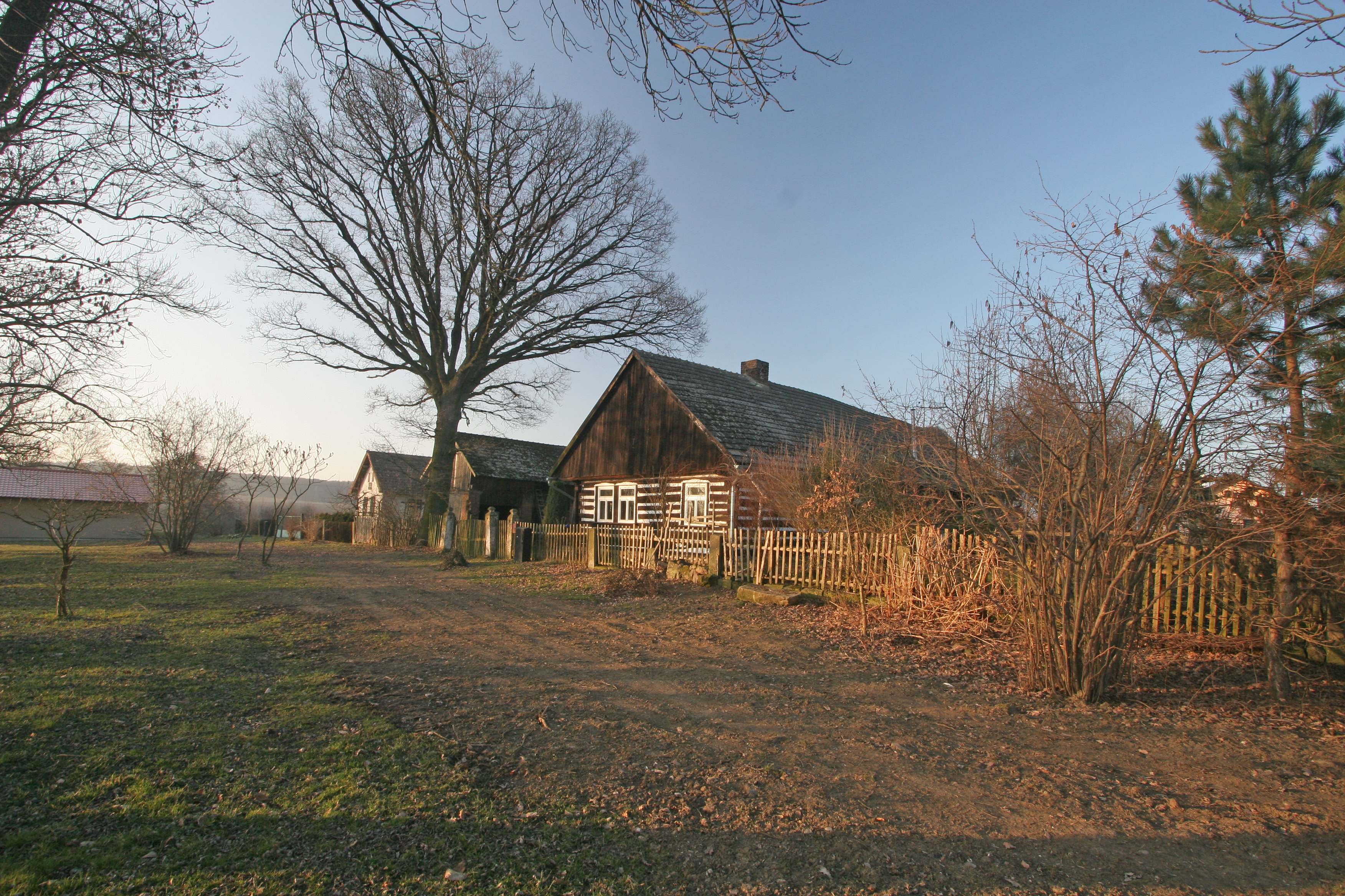 Vrbice čp. 44